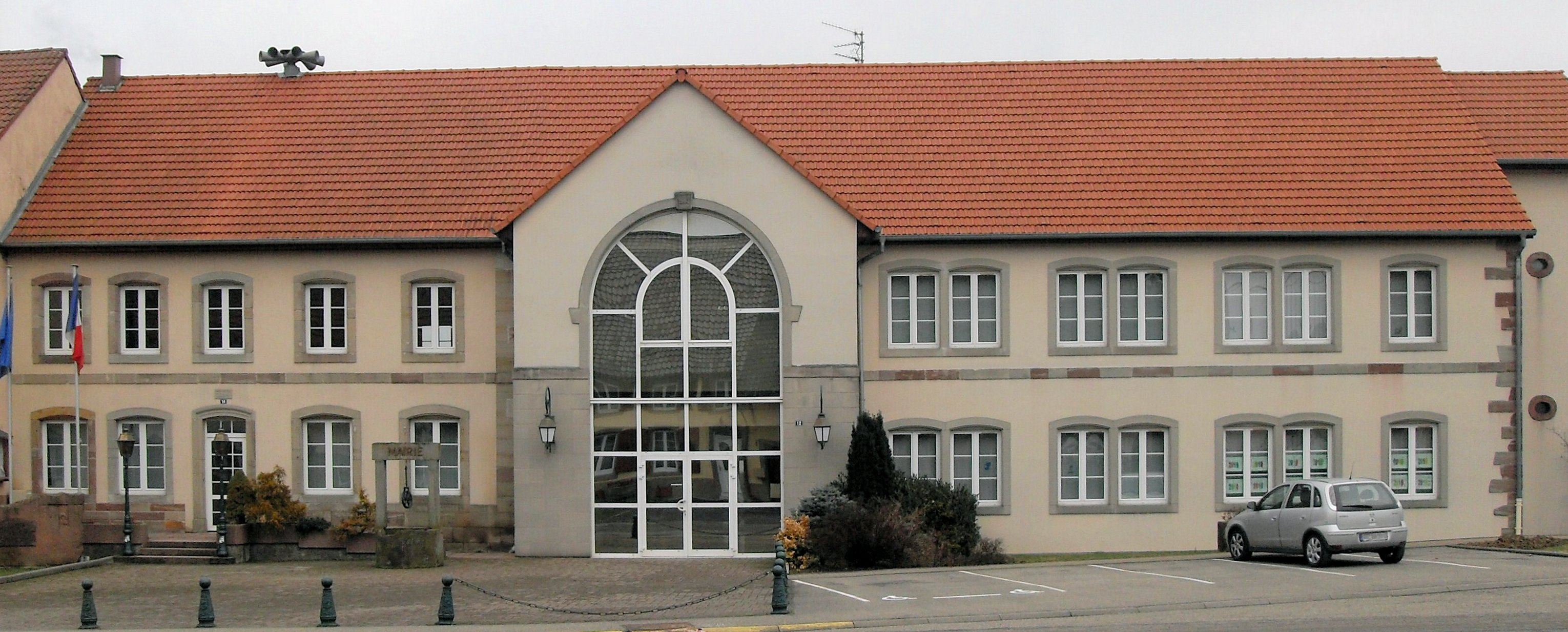 La mairie et l'école à Mittelbronn